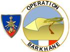 Patch des personnels du SIMu sur l'opérations Barkhane